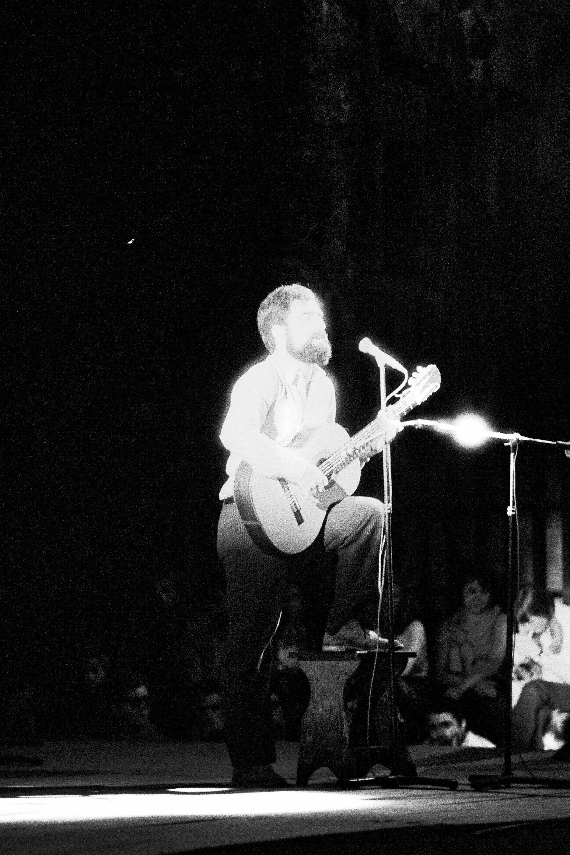 Xabier Lete euskal abeslaria. Ez Dok Amairu taldea. Xabier Lete basque singer. Ez Dok amairu group.